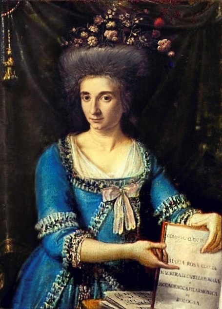 Maria Rosa Coccia, maestra di capella romana and Accademica Filarmonica di Bologna